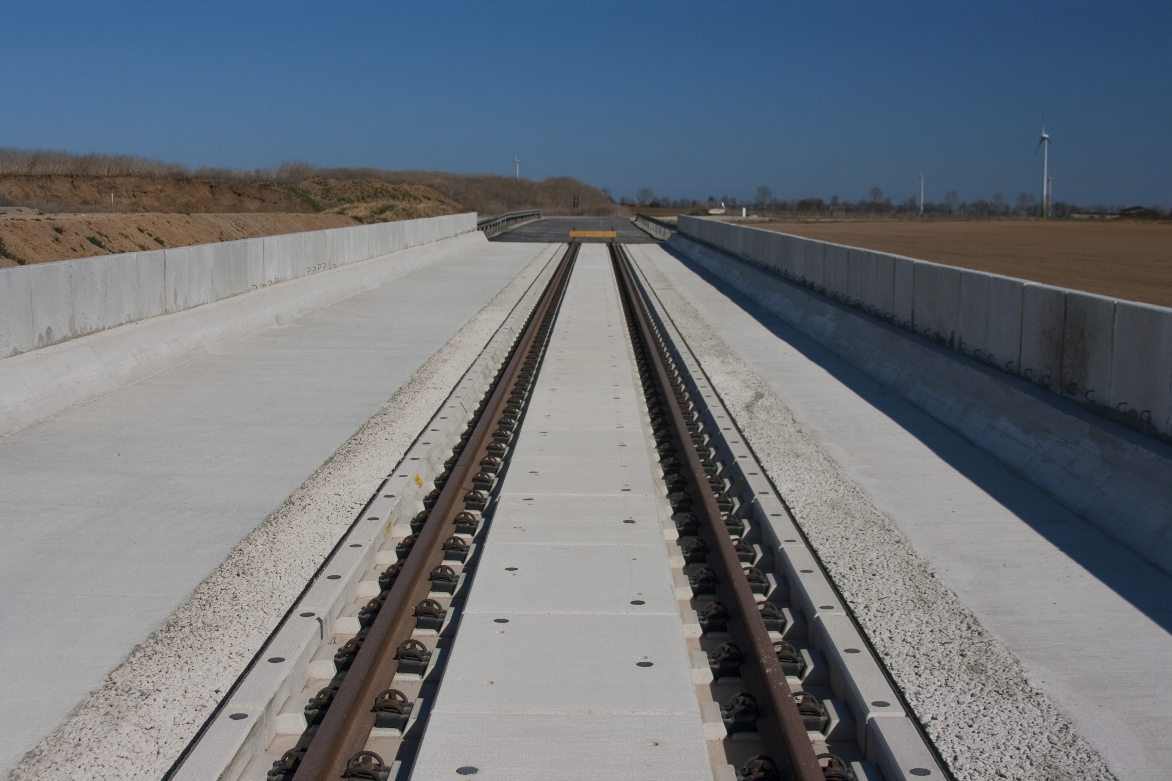 Versuchsstrecke Feste Fahrbahn für Rettungskräfte (Befahrbarkeit im Tunnel) am Ostportal des Osterbergtunnels